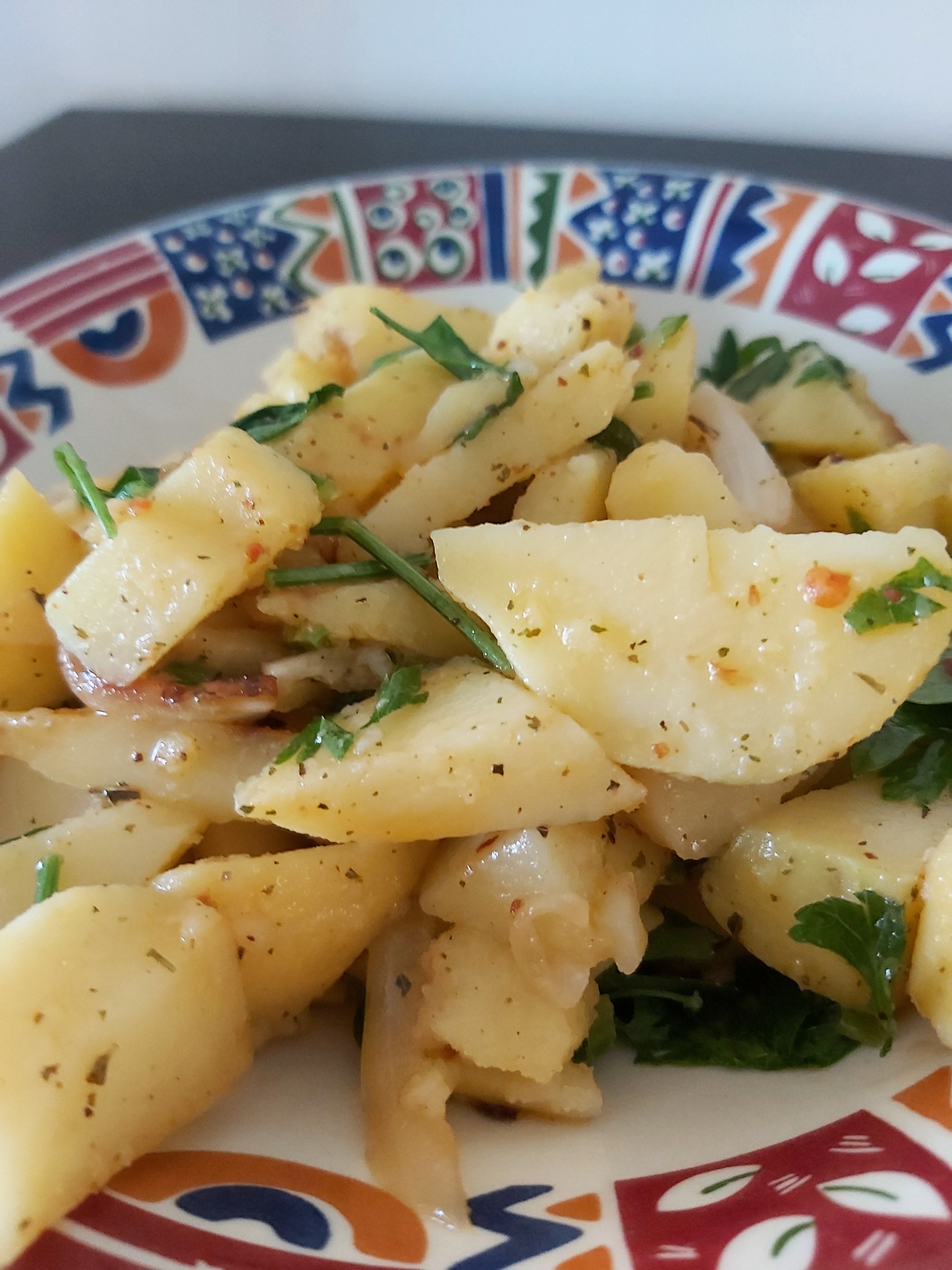 Patates Salatası